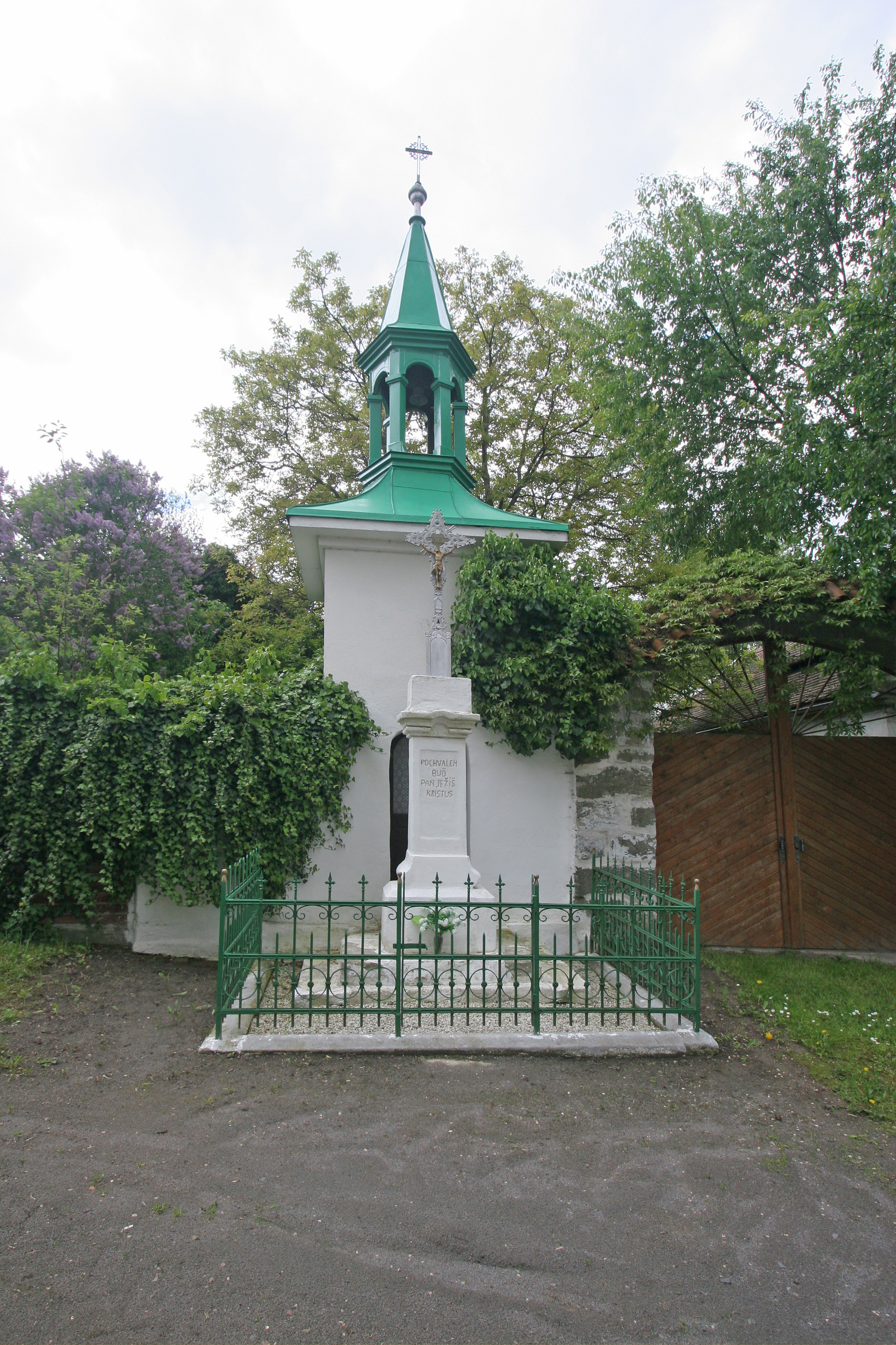 Libanice zvonička a křížek